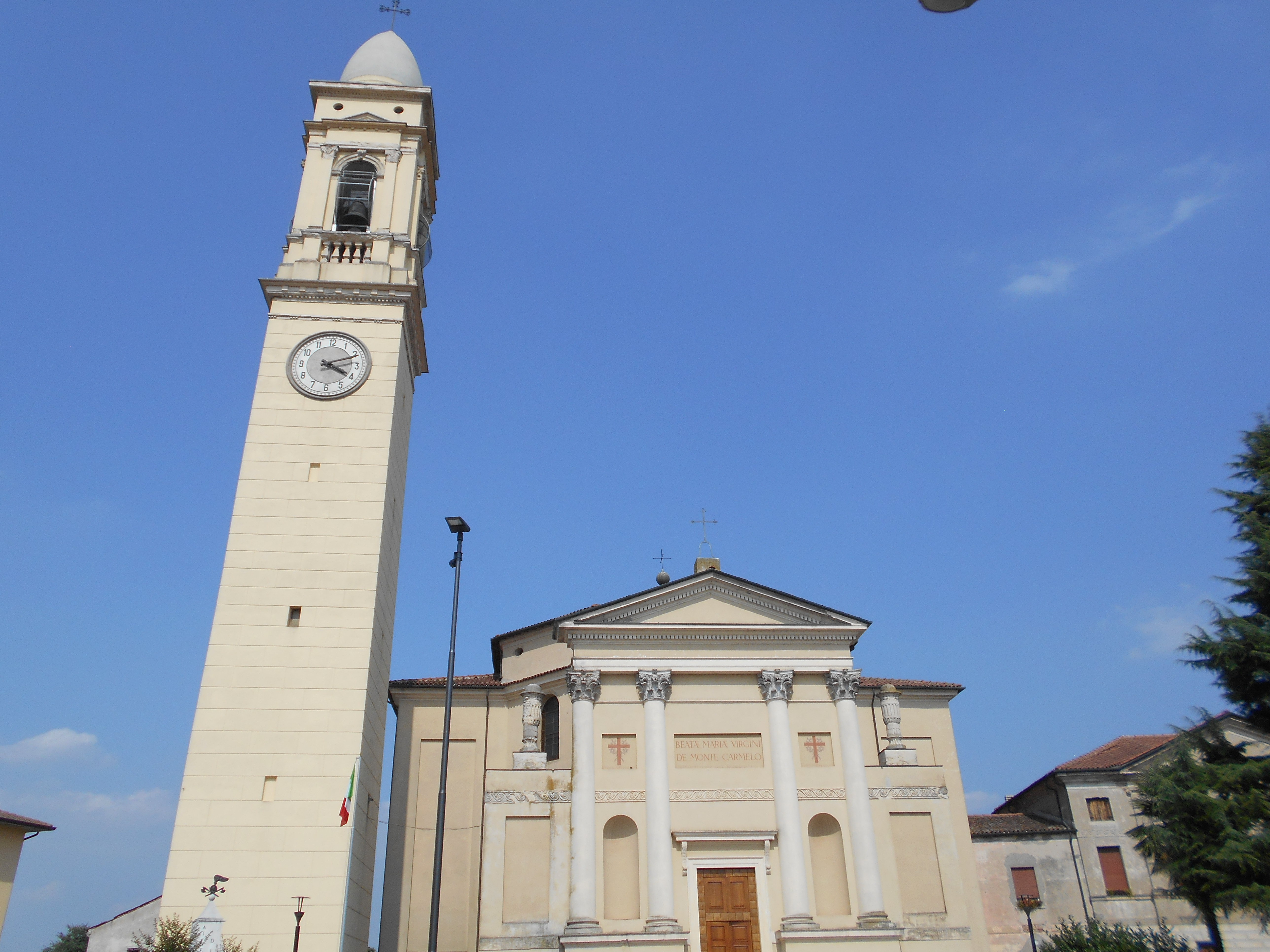 Chiesa della Madonna del Carmine, Roverchiaretta, Roverchiara